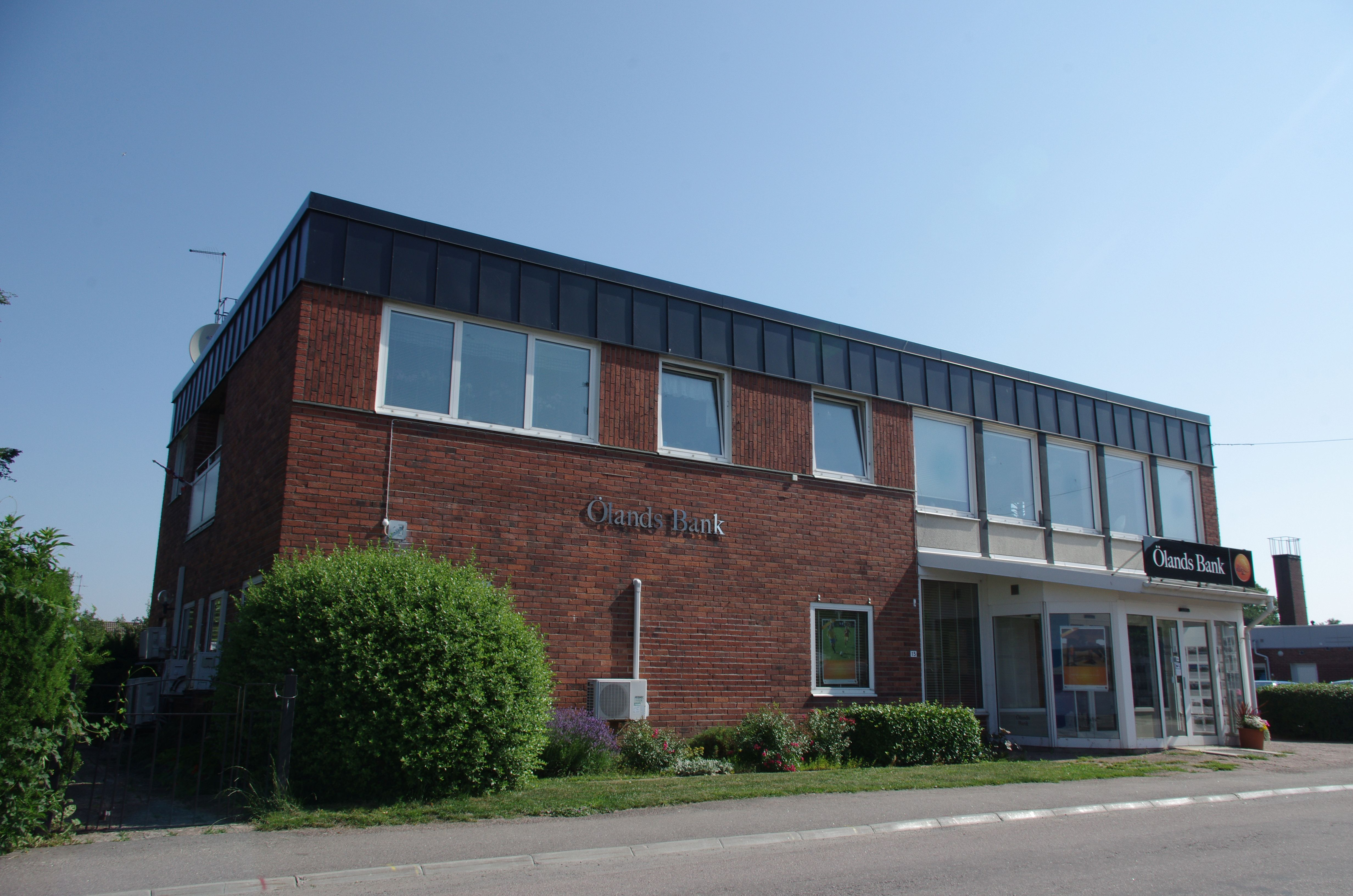 Die Ölands Bank in Mörbylånga. Die Bank ist nur auf Öland in Schweden tätig.